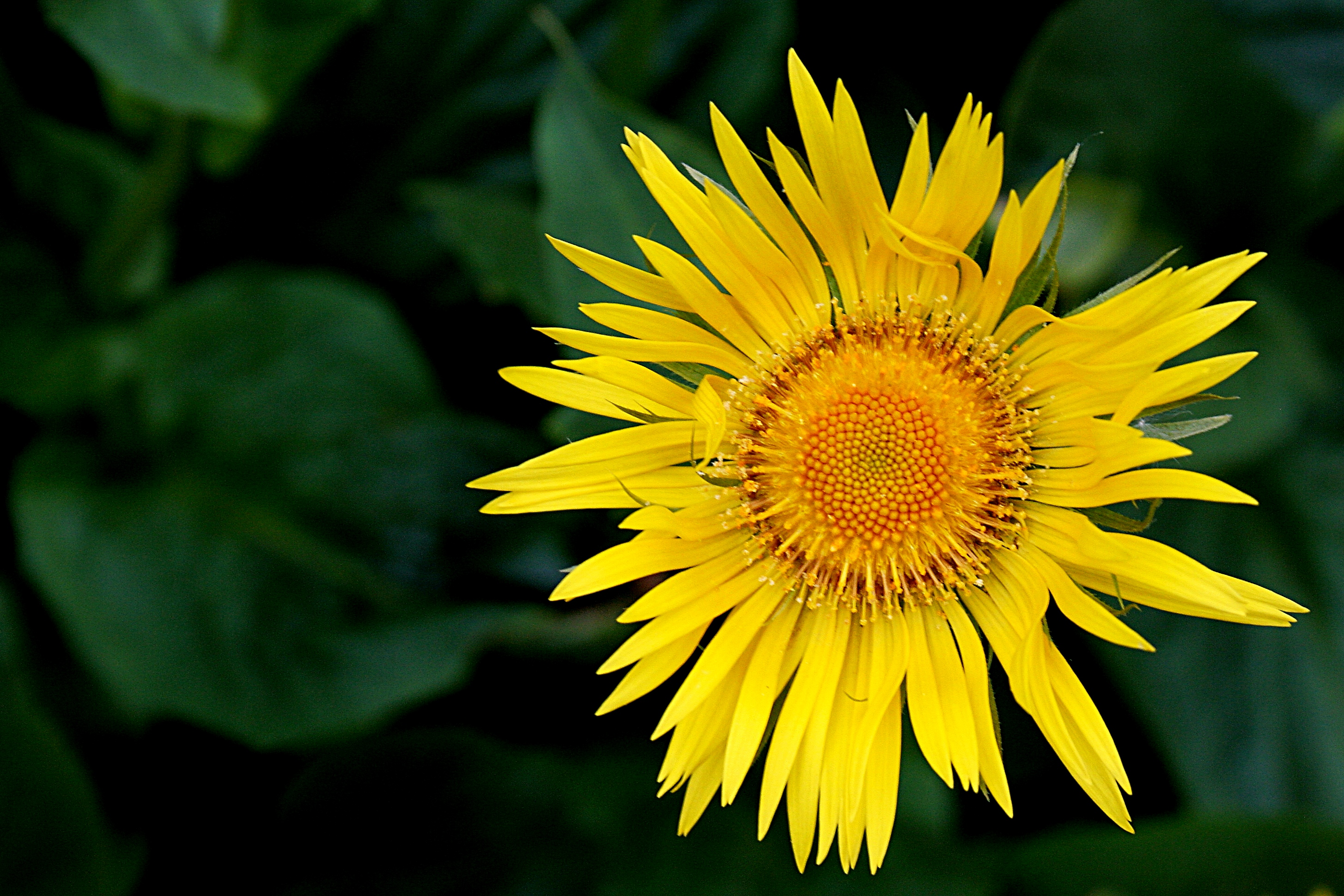 Ísland, Akureyri Botanical Gardens: Gämswurz_(Doronicum_turkestanicum)